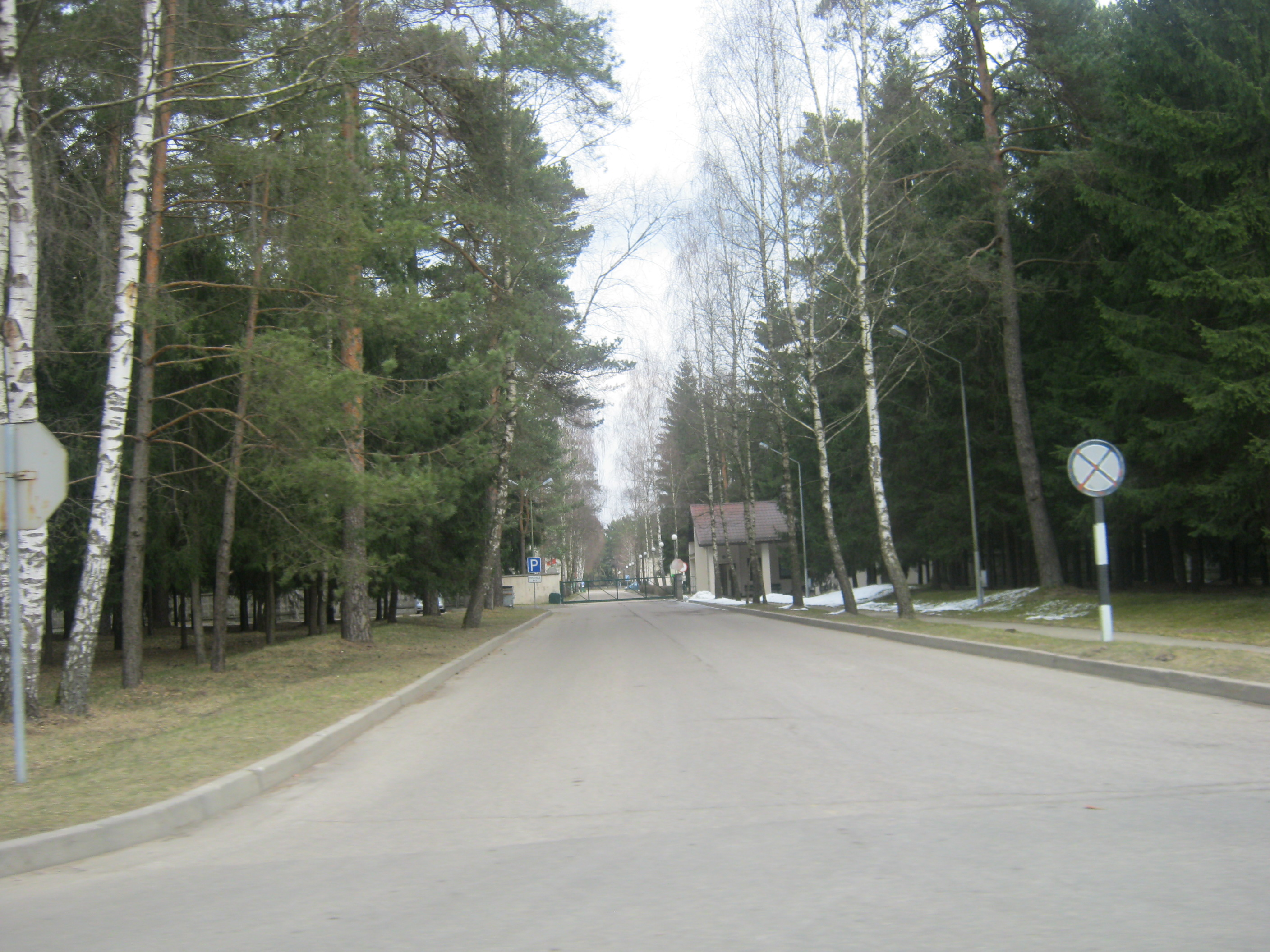 Rukla